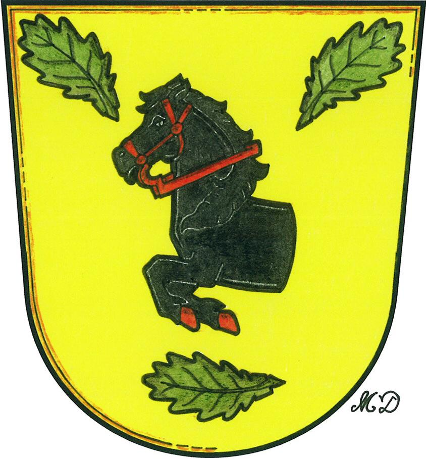 Česky: znak obce Horní Kněžeklady